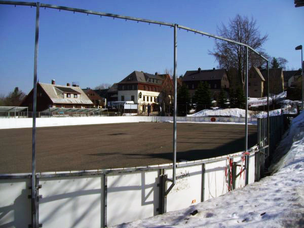 Eisbahn am Hang Oberwiesenthal